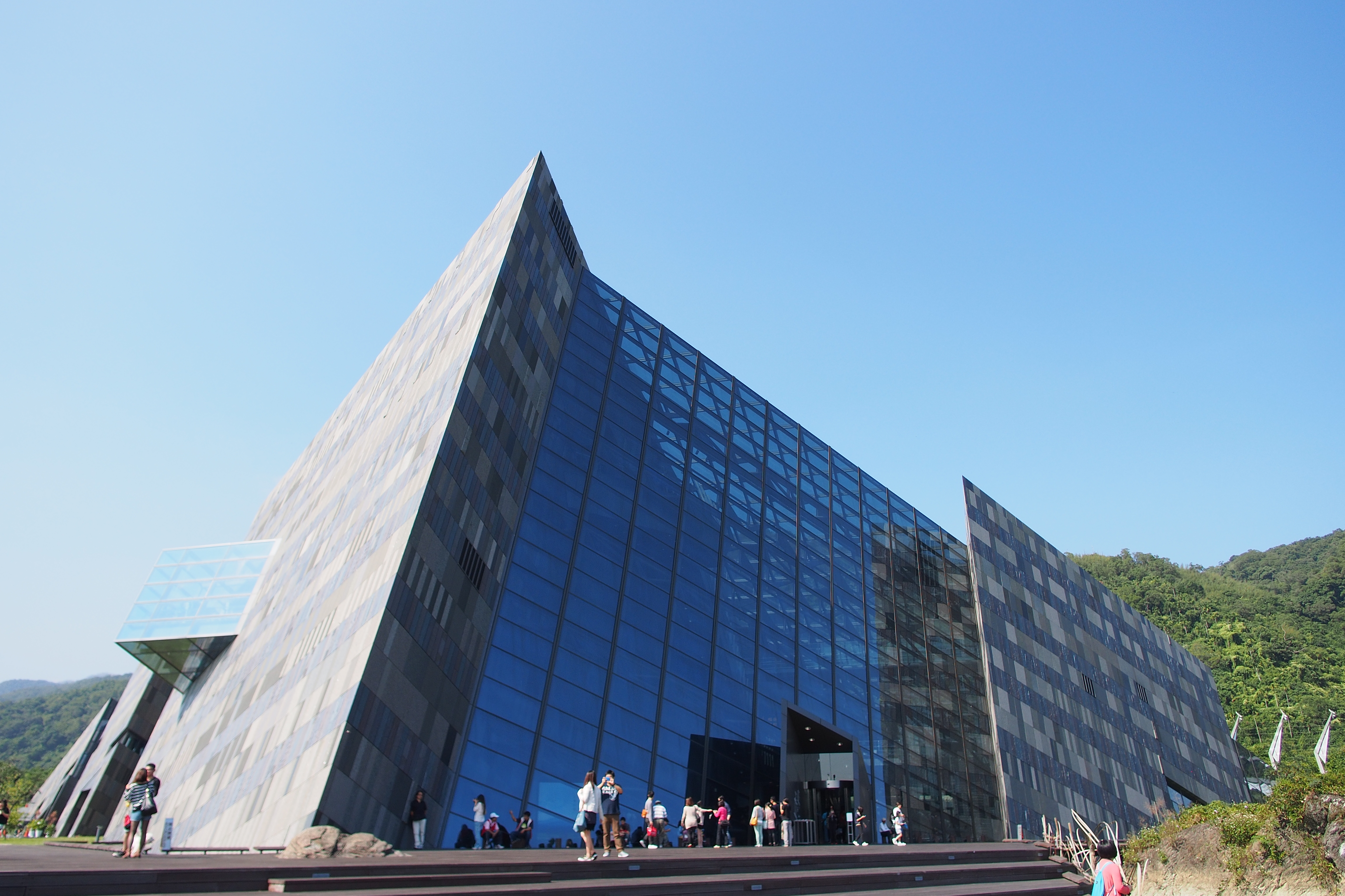 宜蘭縣立蘭陽博物館。